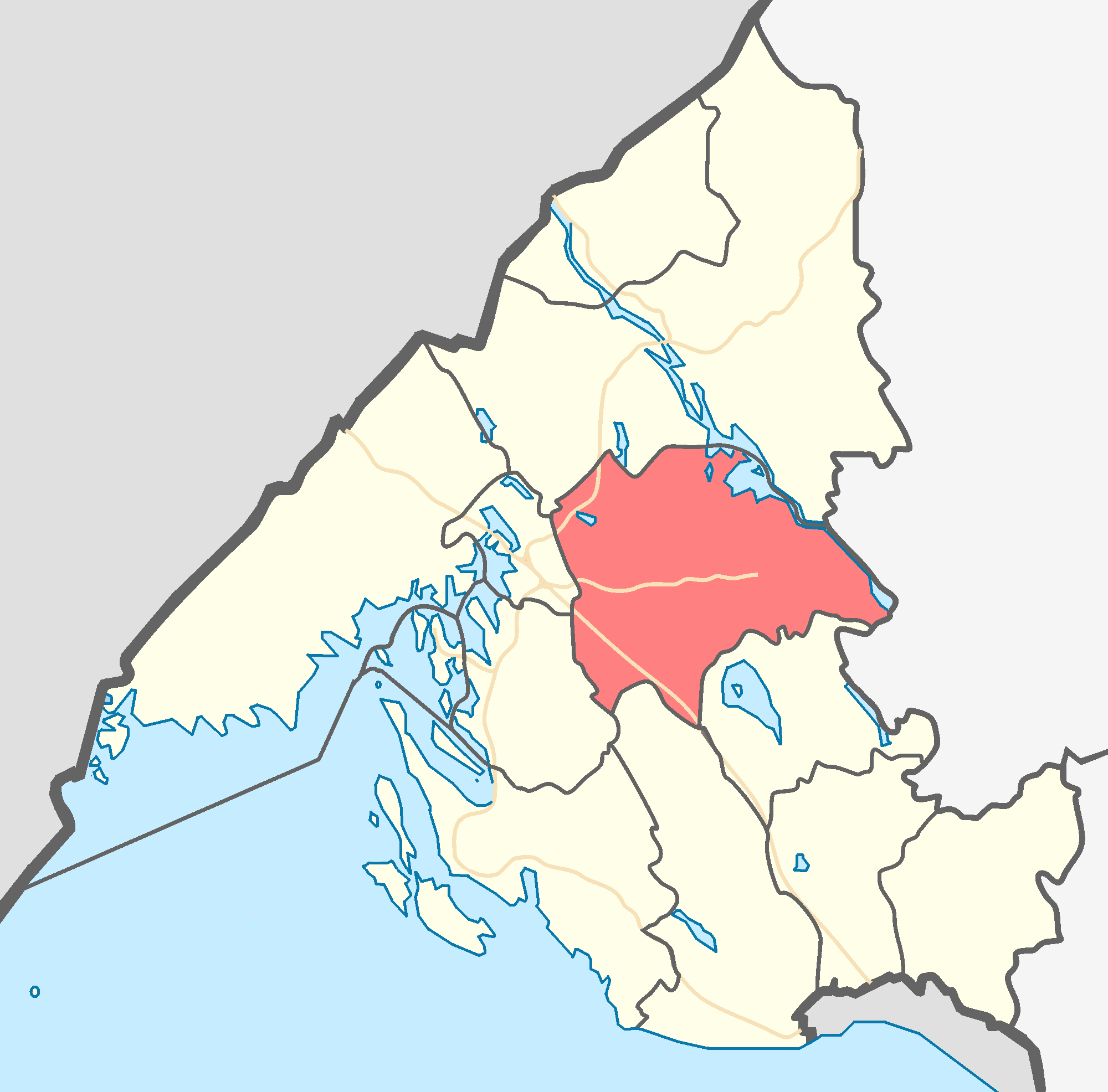 МО Гончаровское сельское поселение на карте Выборгского района Ленинградской области